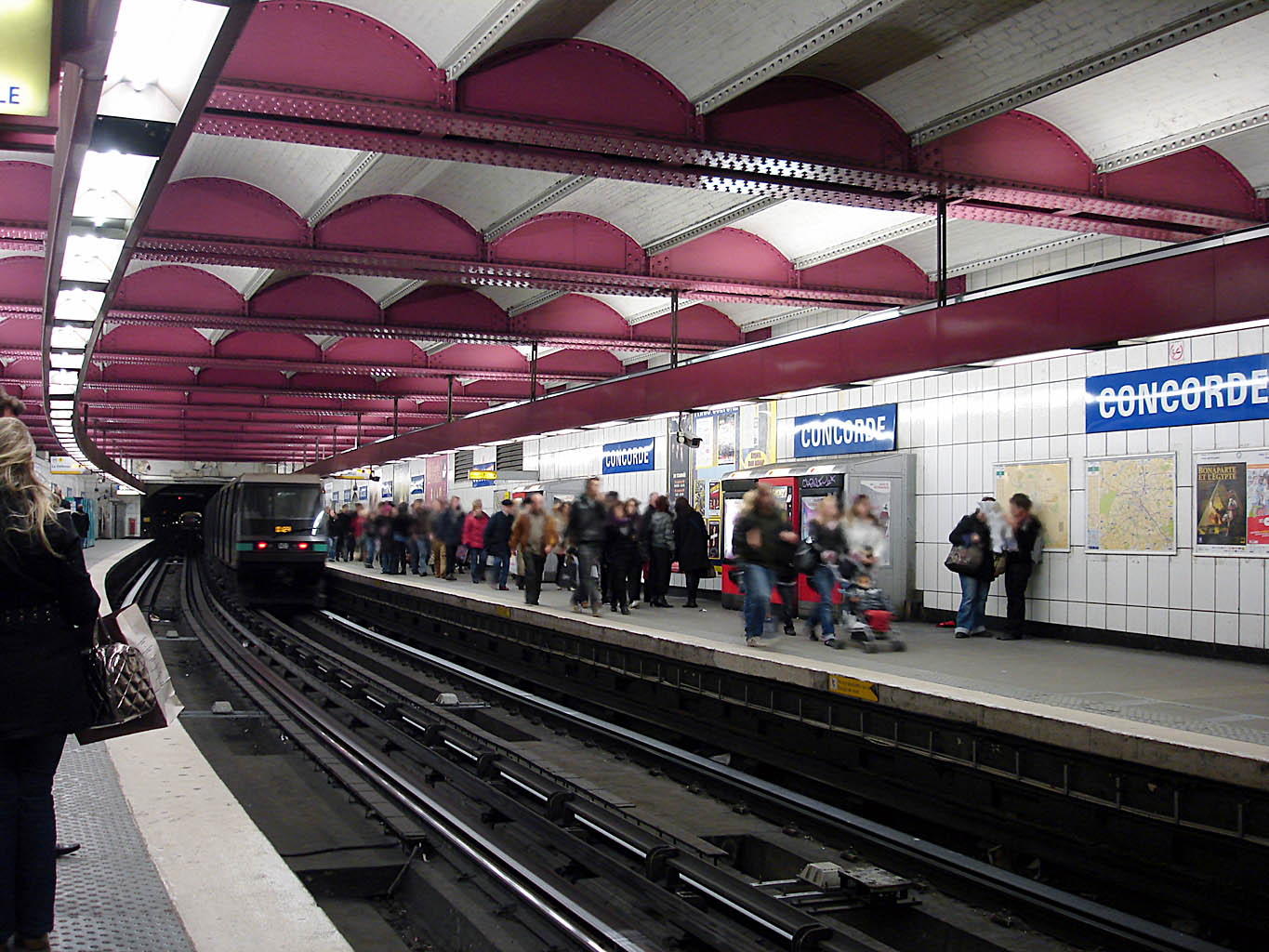 Station Concorde de la ligne 1 du métro de Paris, France.